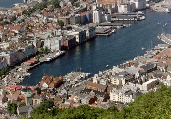 Eigen foto, gemaakt tijdens vakantie in Noorwegen